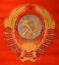 Герб ссср